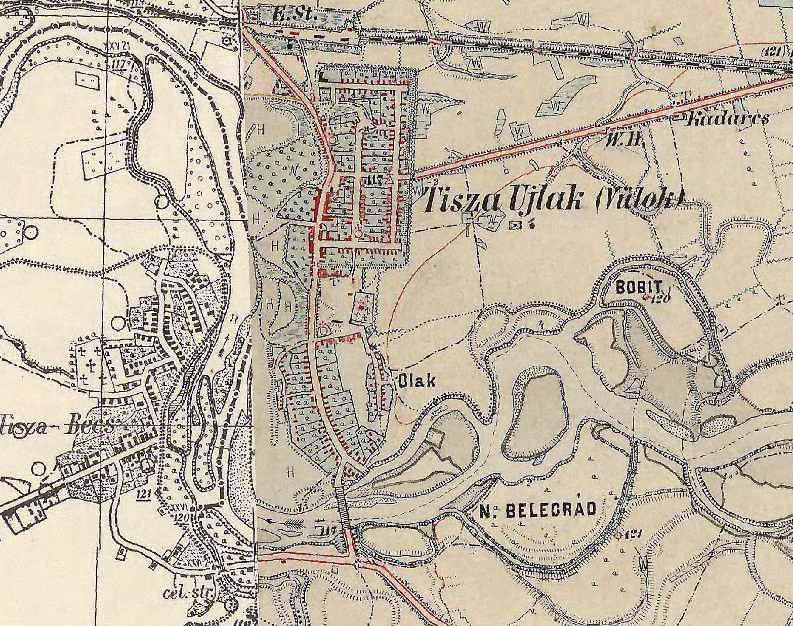 Tiszaújlak és környéke 1872–1884 között. Ferencjózsefi topográfiai térkép, eredeti méretaránya 1:25000